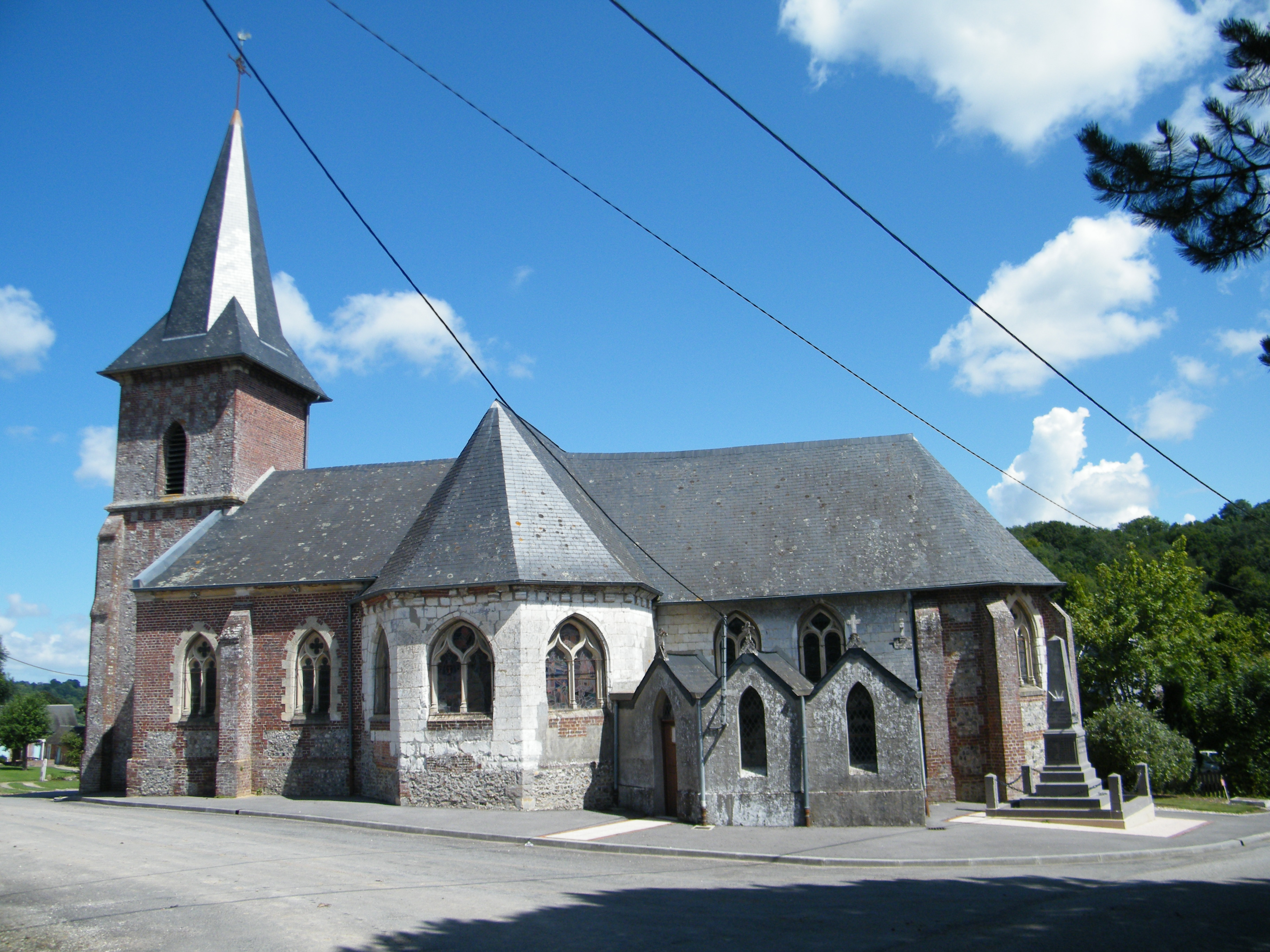 Avesnes-en-Val, Seine-Maritime, France, église (2)